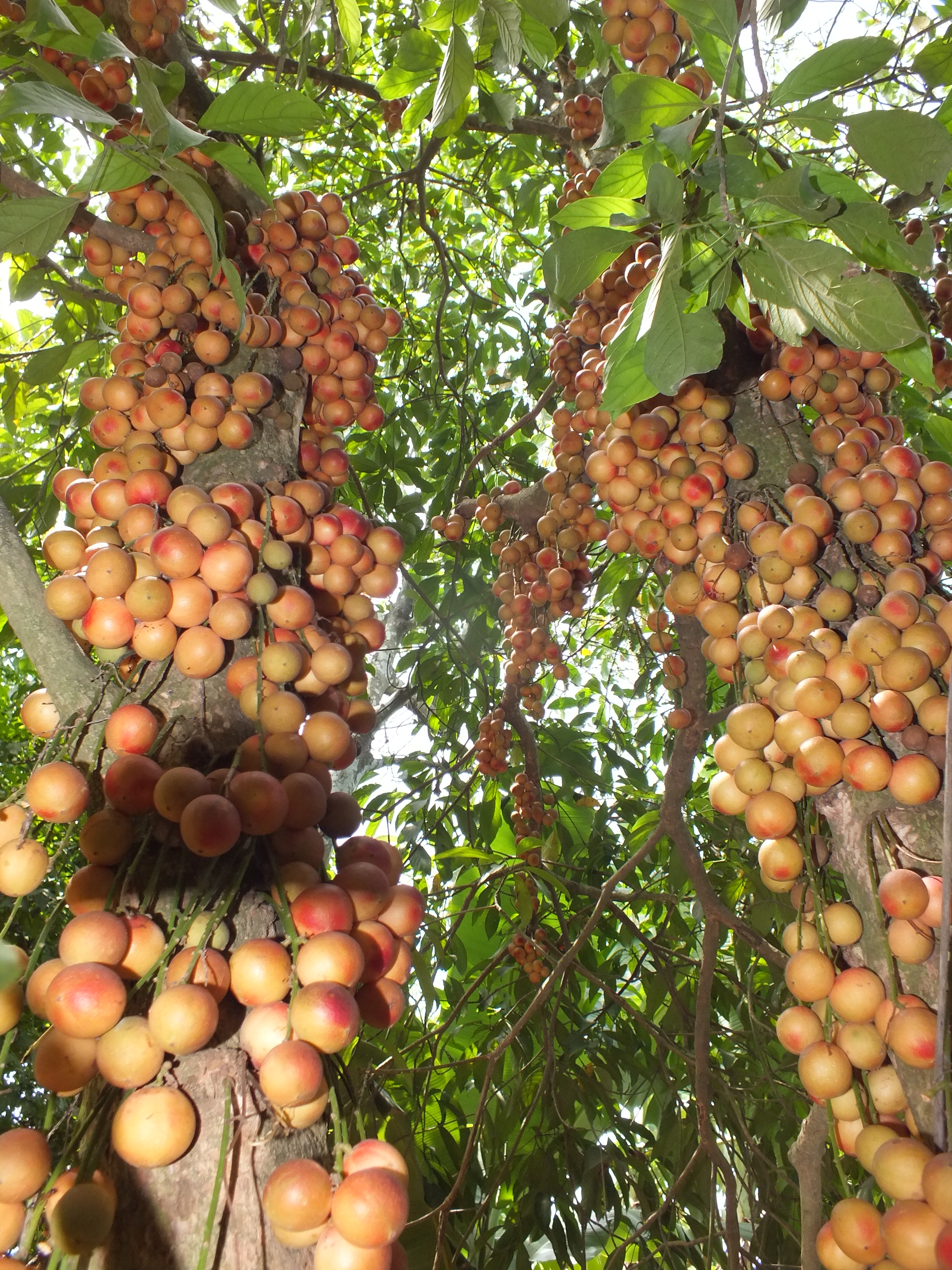 Baccaurea 木奶果属 Chi Dâu da in Hue-Vietnam